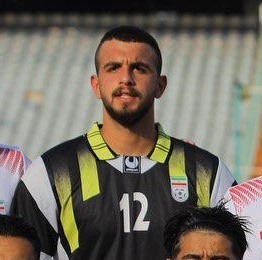 معراج اسماعیلی